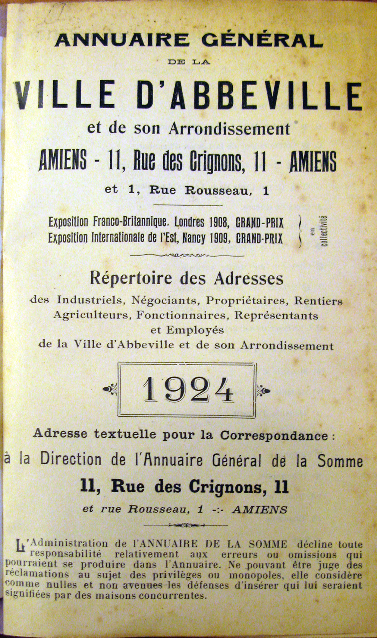 Annuaire général d'Abbeville et de son arrondissement, 1924 (France) Page 1.